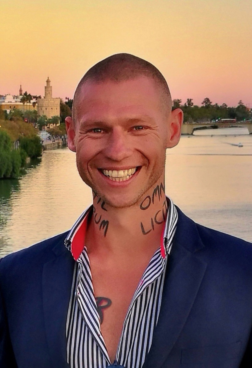 Christian Zippel im Sommer 2019